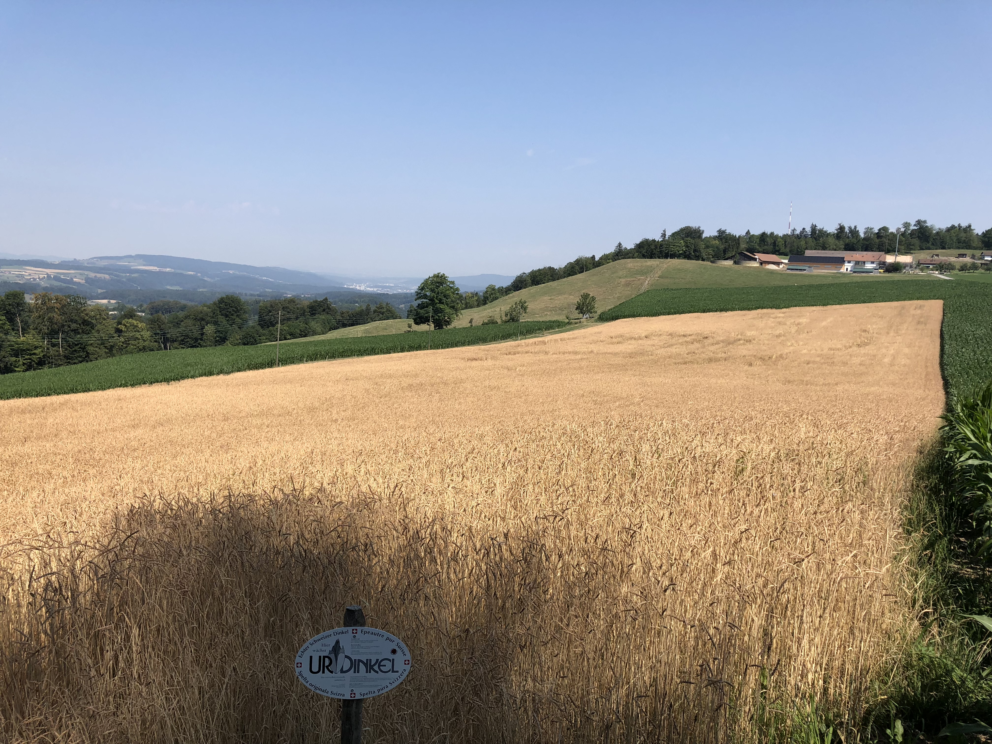 UrDinkel